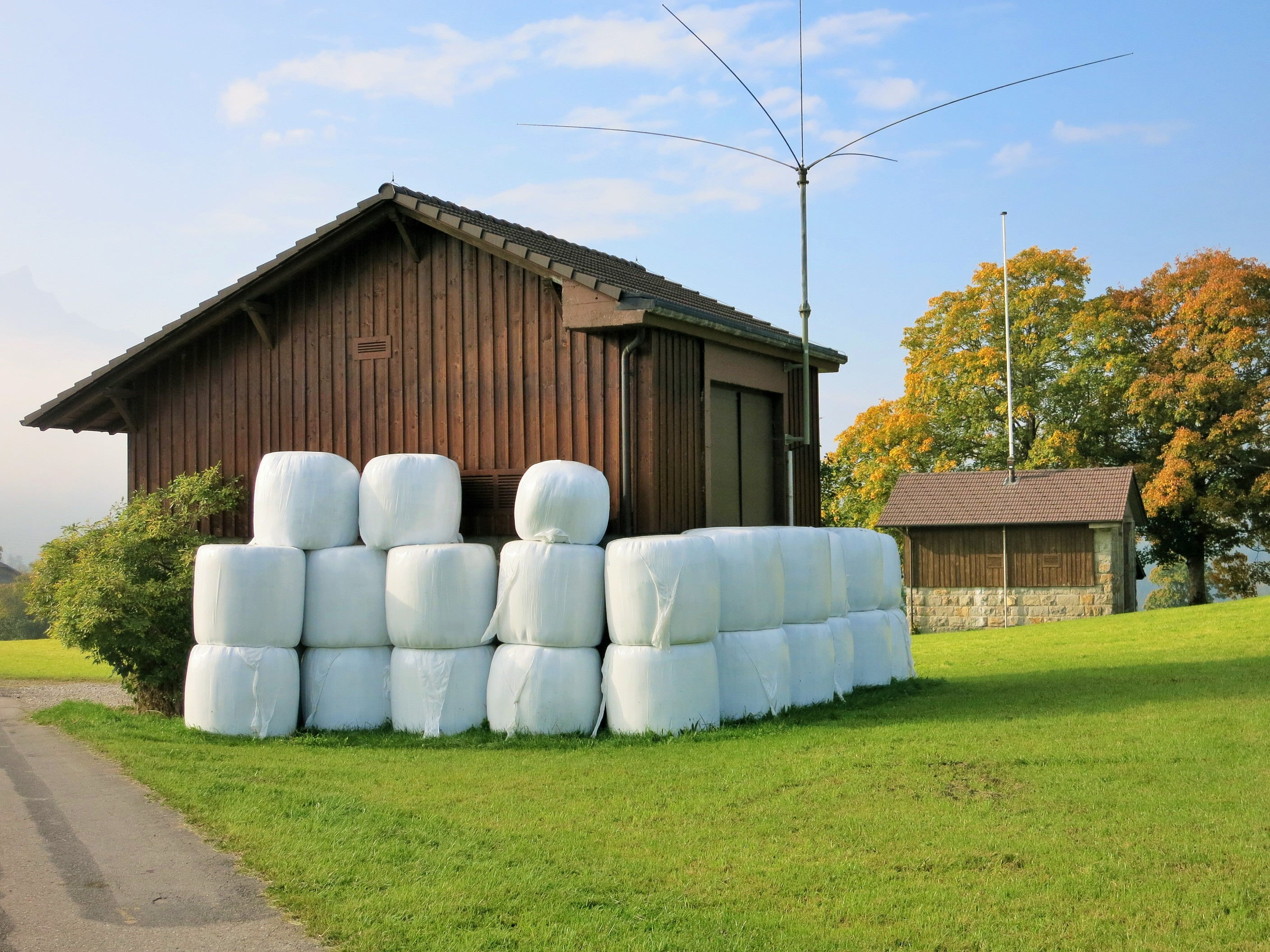 Artilleriewerk Aeschiried BE, Schweiz